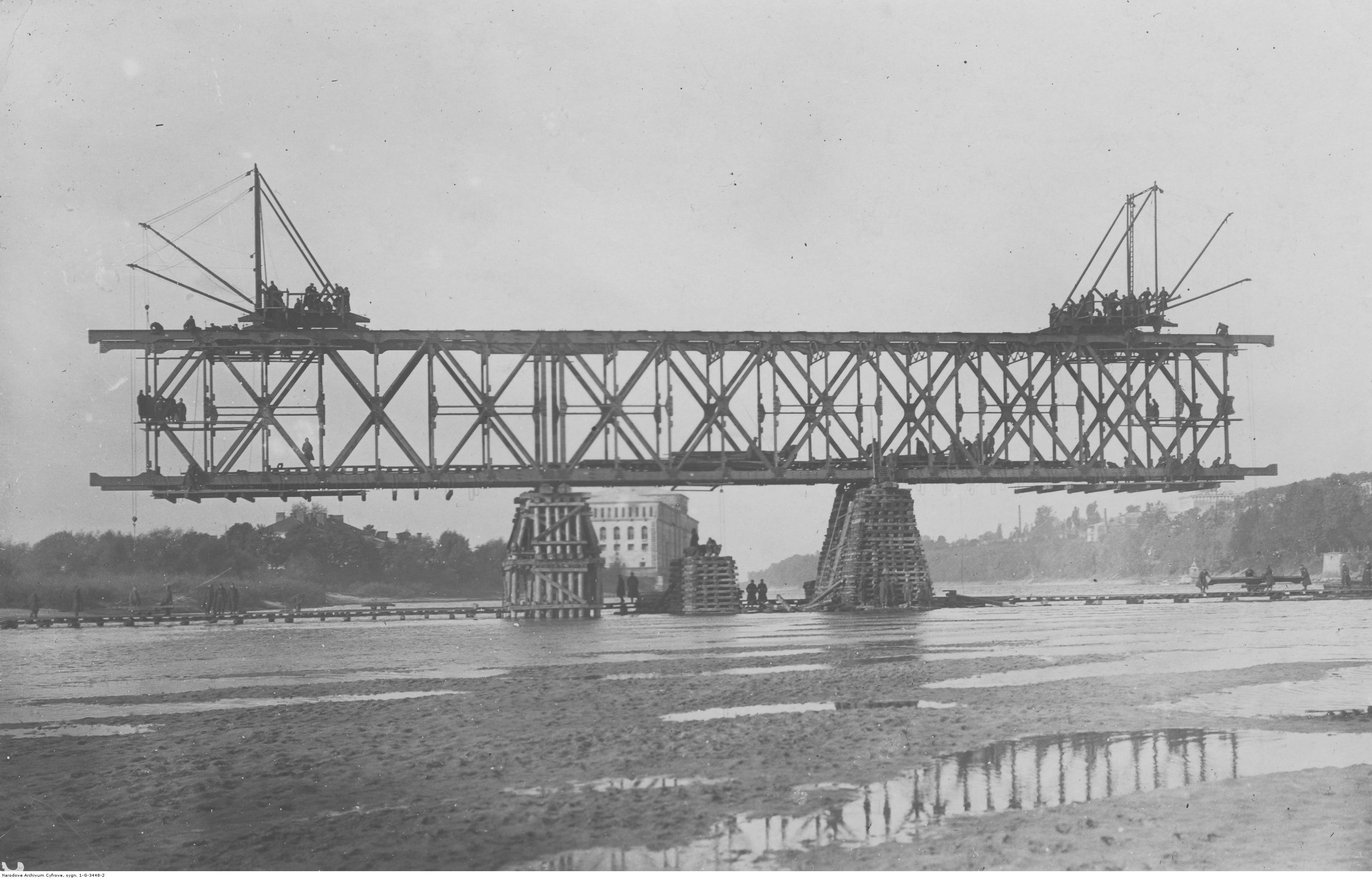 Most kolejowy na Narwi budowany przez 1 i 2 Pułk Saperów Kolejowych. Fragment mostu. W tle spichlerz Twierdzy Modlin. Koncern Ilustrowany Kurier Codzienny - Archiwum Ilustracji. Sygnatura: 1-G-3448-2